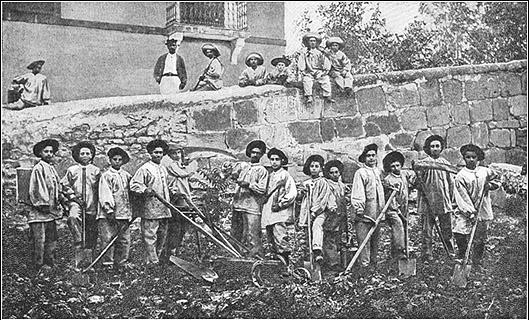 Apprentis à la ferme-école de l'Alliance israélite universelle à Djedeida (Tunisie) / Apprentices at the Farm School of the Alliance Israélite Universelle in Djedeida (Tunis)